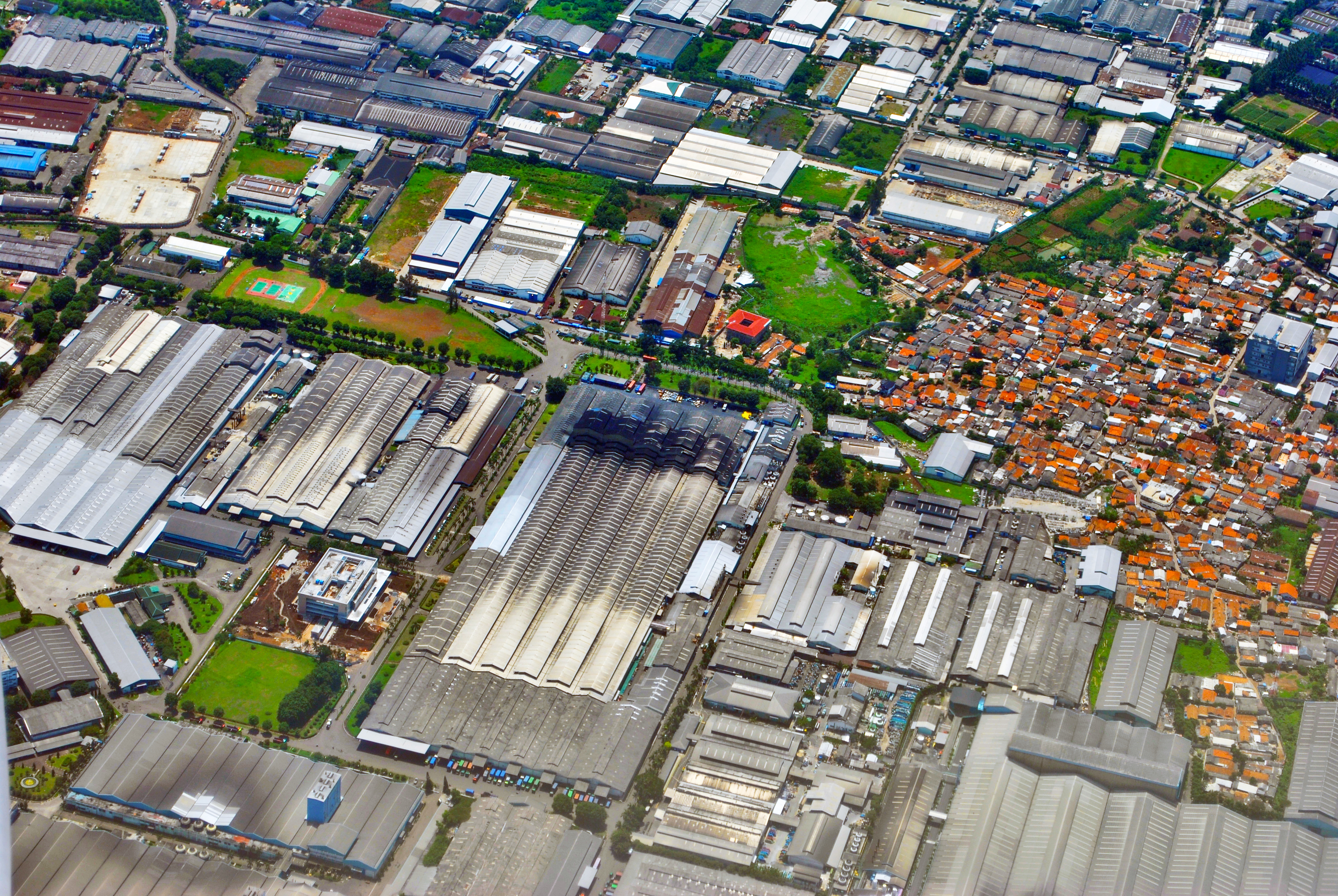 Kawasan Pabrik